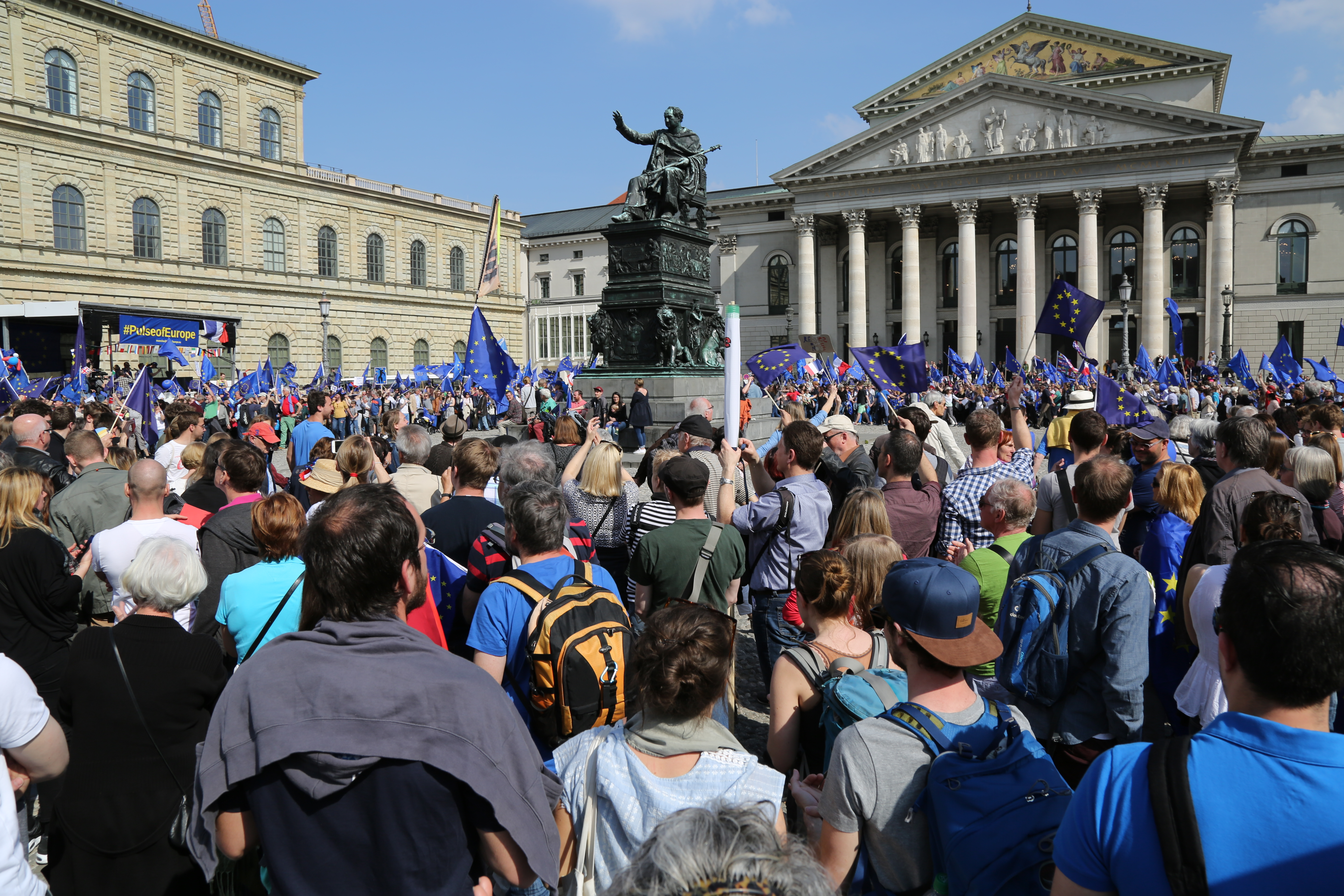 Pulse of Europe München, Max-Joseph-Platz